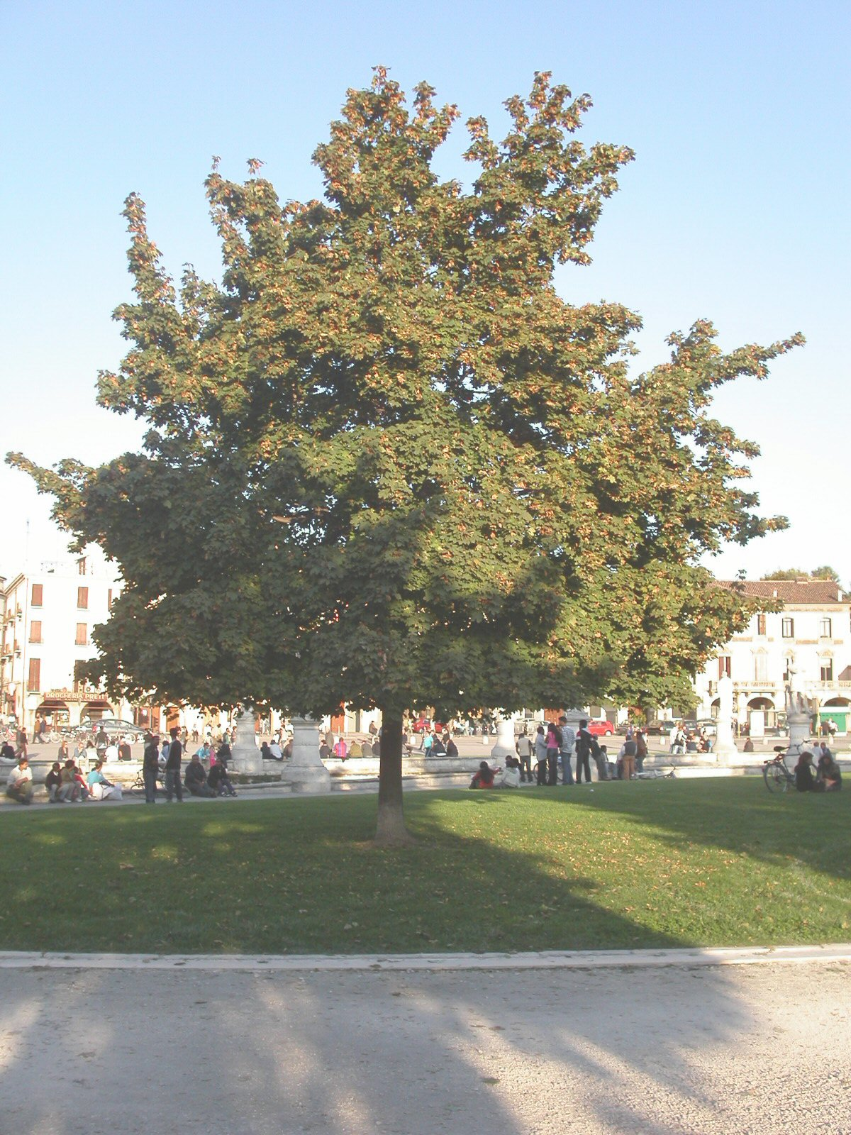 Acero riccio, varietà Summershade, in Prato della Valle, Padova.